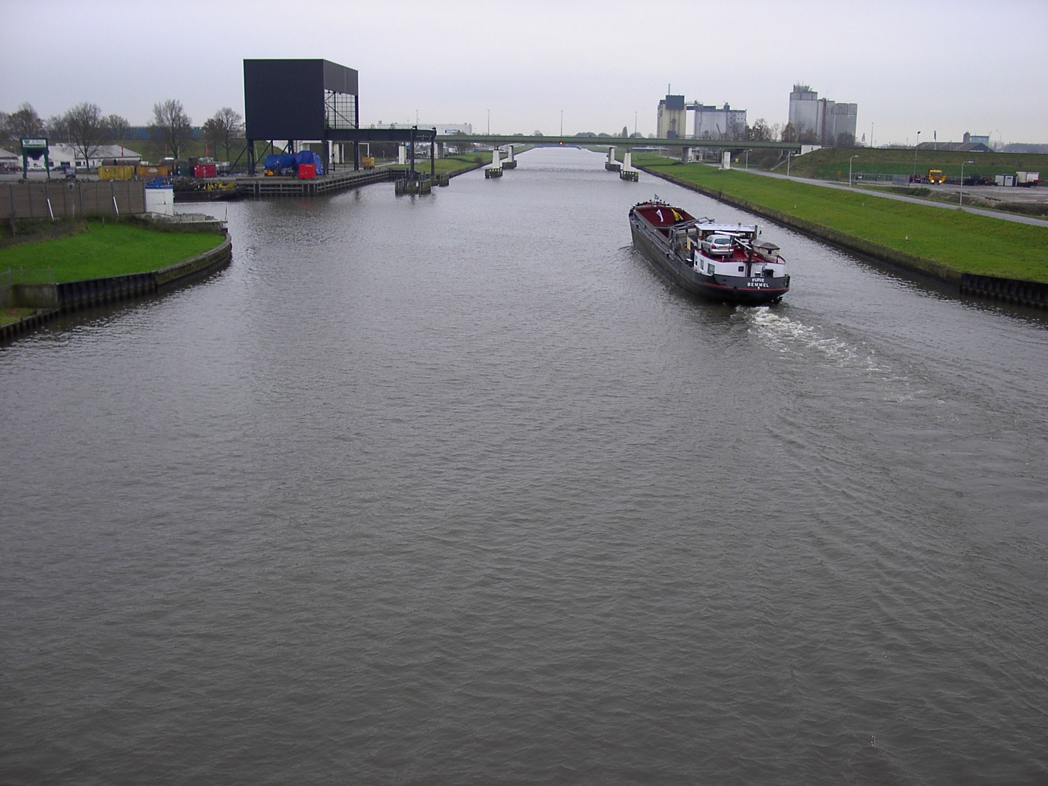 Het Zwolle-IJsselkanaal in Zwolle verbindt de IJssel met het Zwarte Water. Foto genomen vanaf de voetgangersbrug bij de Gasthuisdijk. Blik richting de IJssel.